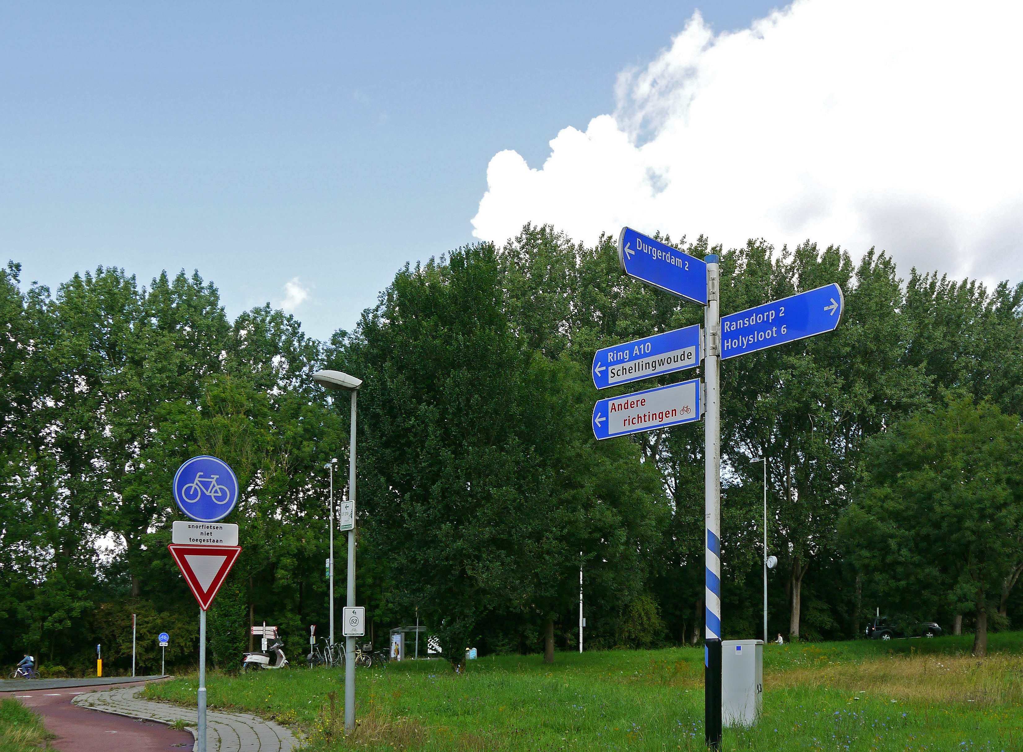 Wegweiser in Amsterdam. Radler finden am Laternenmast den Weg zum Knotenpunkt 52.